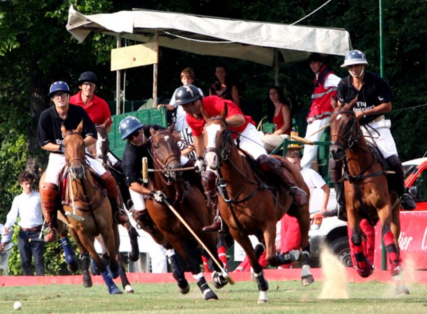 Sal. Oppenheim Cup Finale 2005